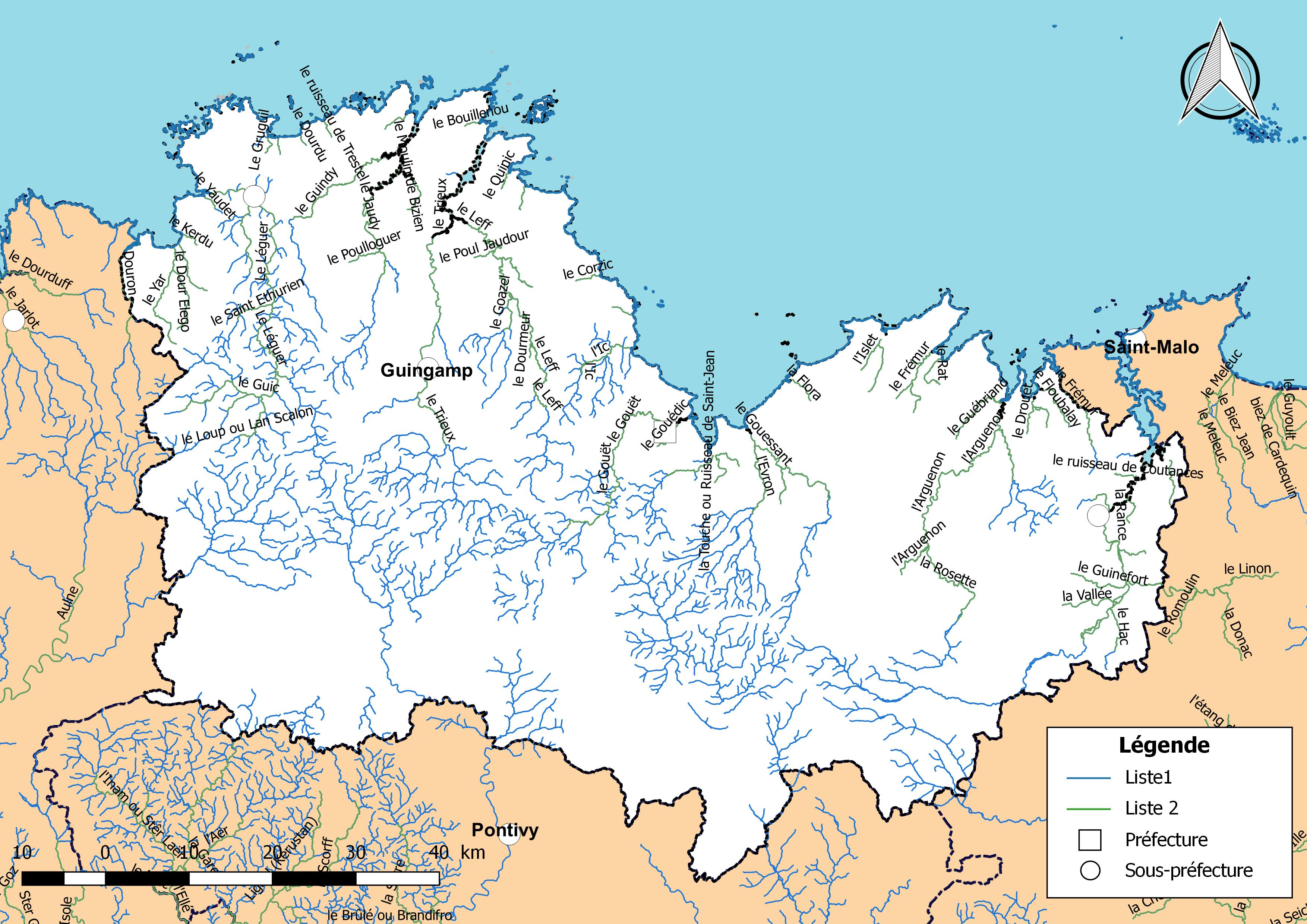 Classement des cours d'eau du département des Côtes-d'Armor (France) au titre de la continuité écologique (article L214.17 I du Code de l'environnement).